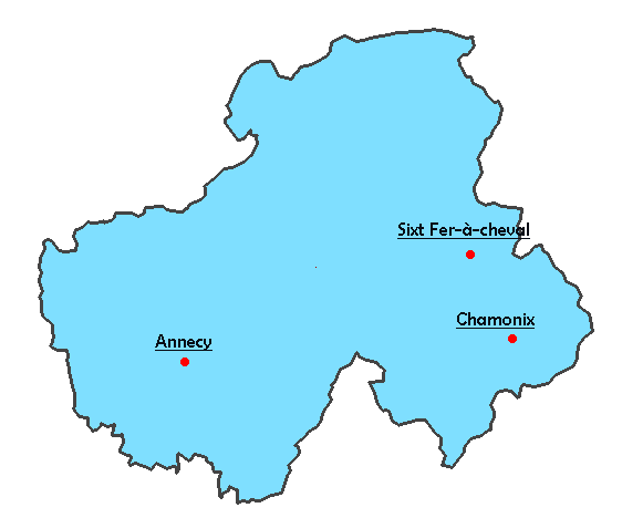 Carte de localisation de Sixt Fer-à-Cheval